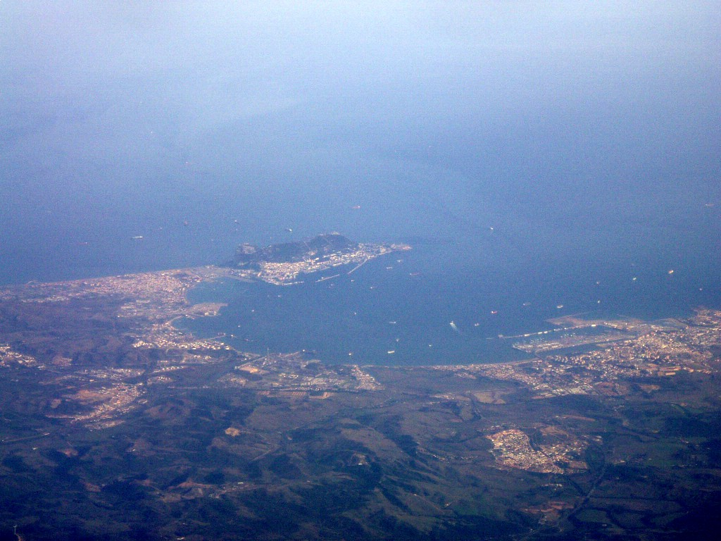 Bahia de Algeciras y Gibraltar